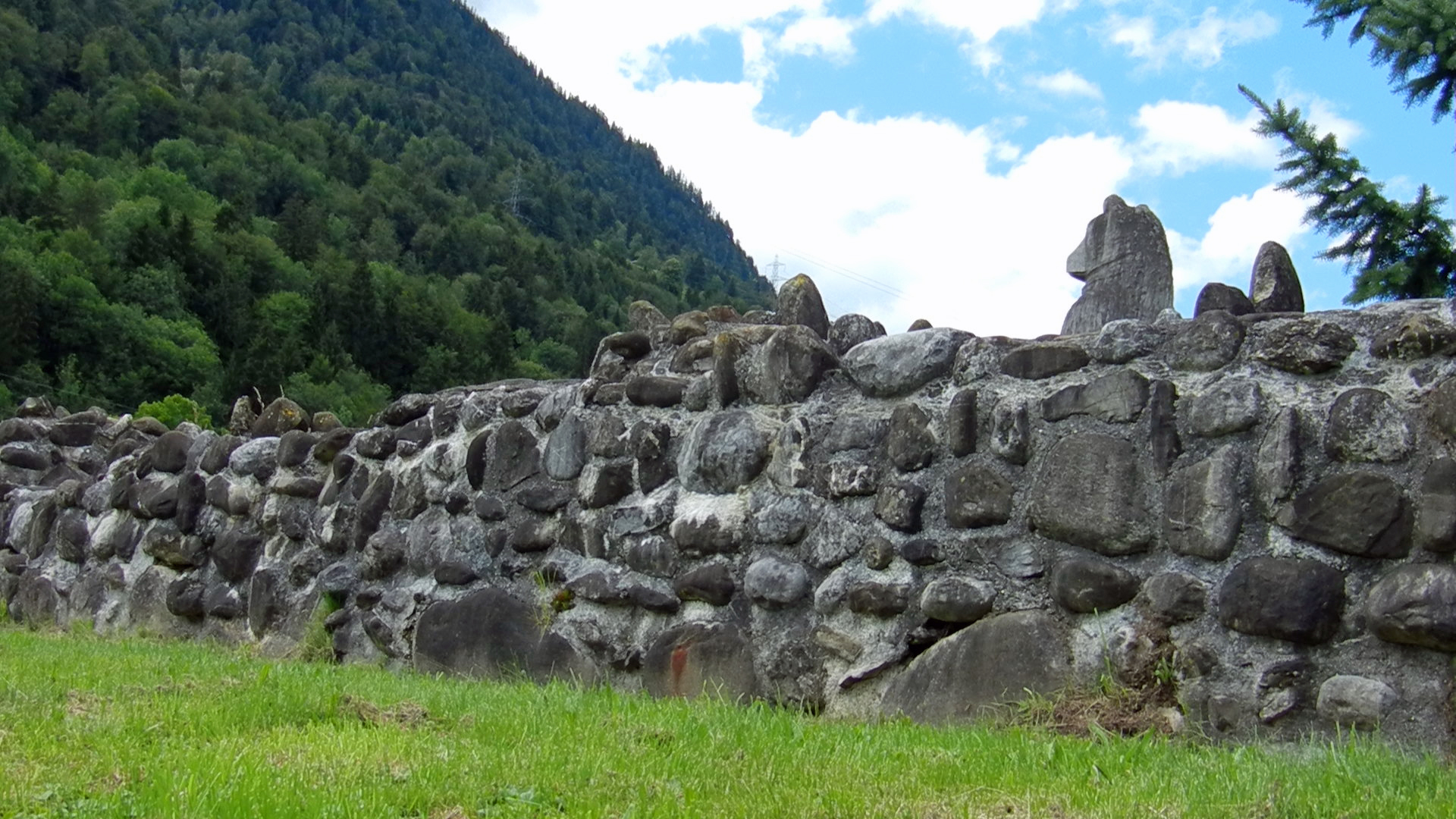 Schweizer Kulturgut von nationaler Bedeutung, mittelalterliche Talsperre